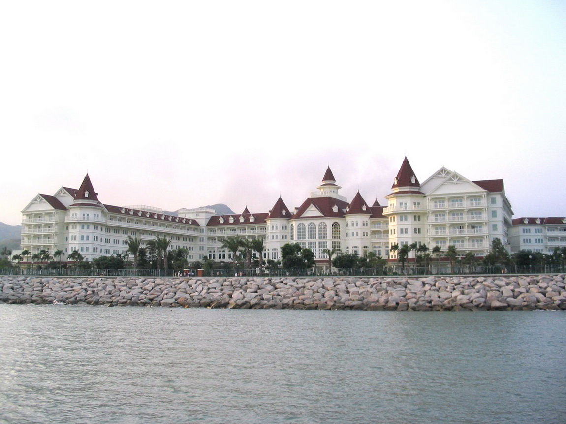 Hong Kong Disneyland Hotel